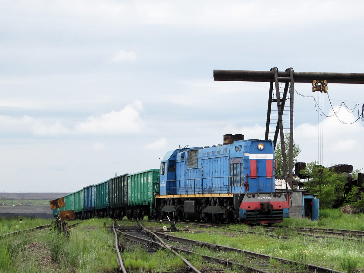 Маневровый тепловоз ТЭМ7А-0242 в районе шахты имени Костенко (Караганда, Казахстан)